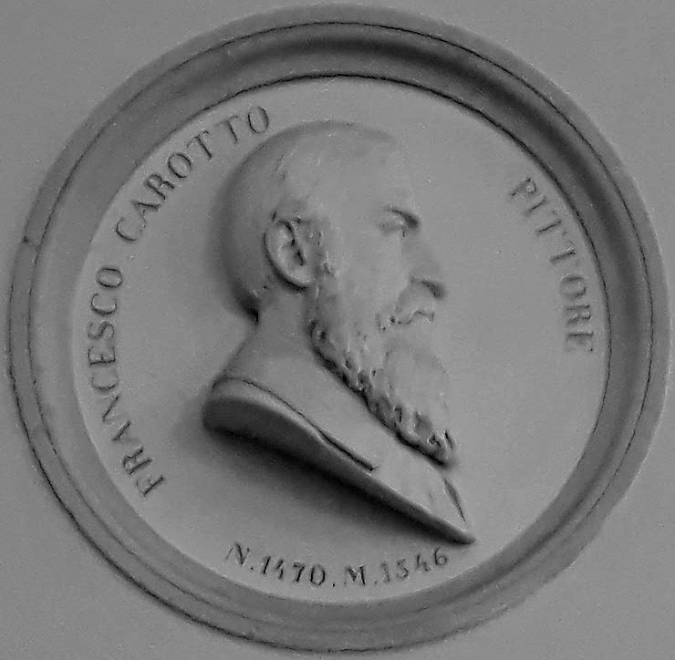 Effige del pittore Giovan Francesco Caroto (1480-c.1555), conservata nella Protomoteca della Biblioteca Civica di Verona